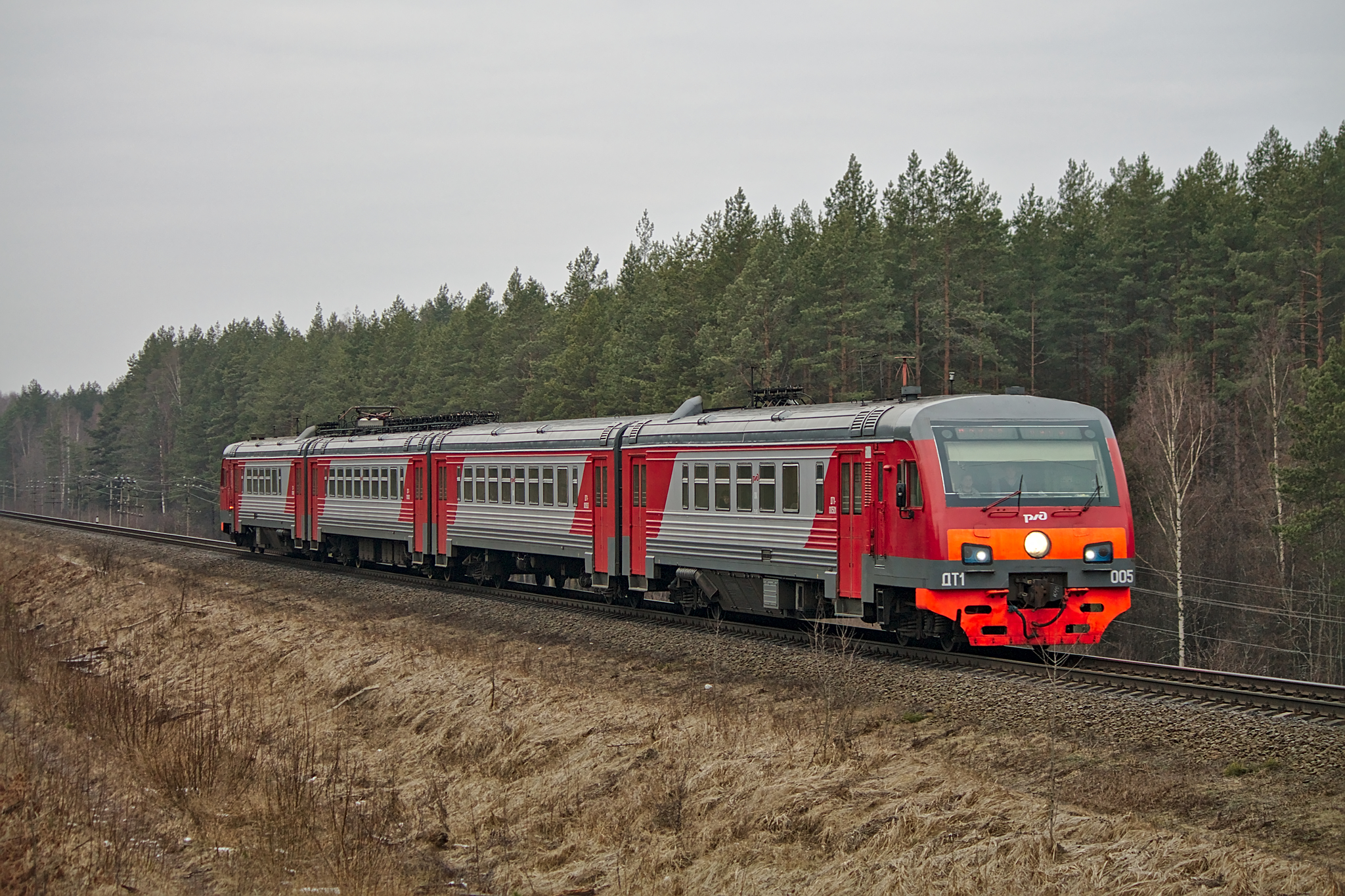 ДТ1-005, 144 км - Луга-I, маршрут Псков - Луга. см. фото 583069 в альбоме автора